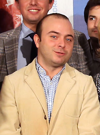 Esperanza Aguirre con afiliados del PP de Rivas